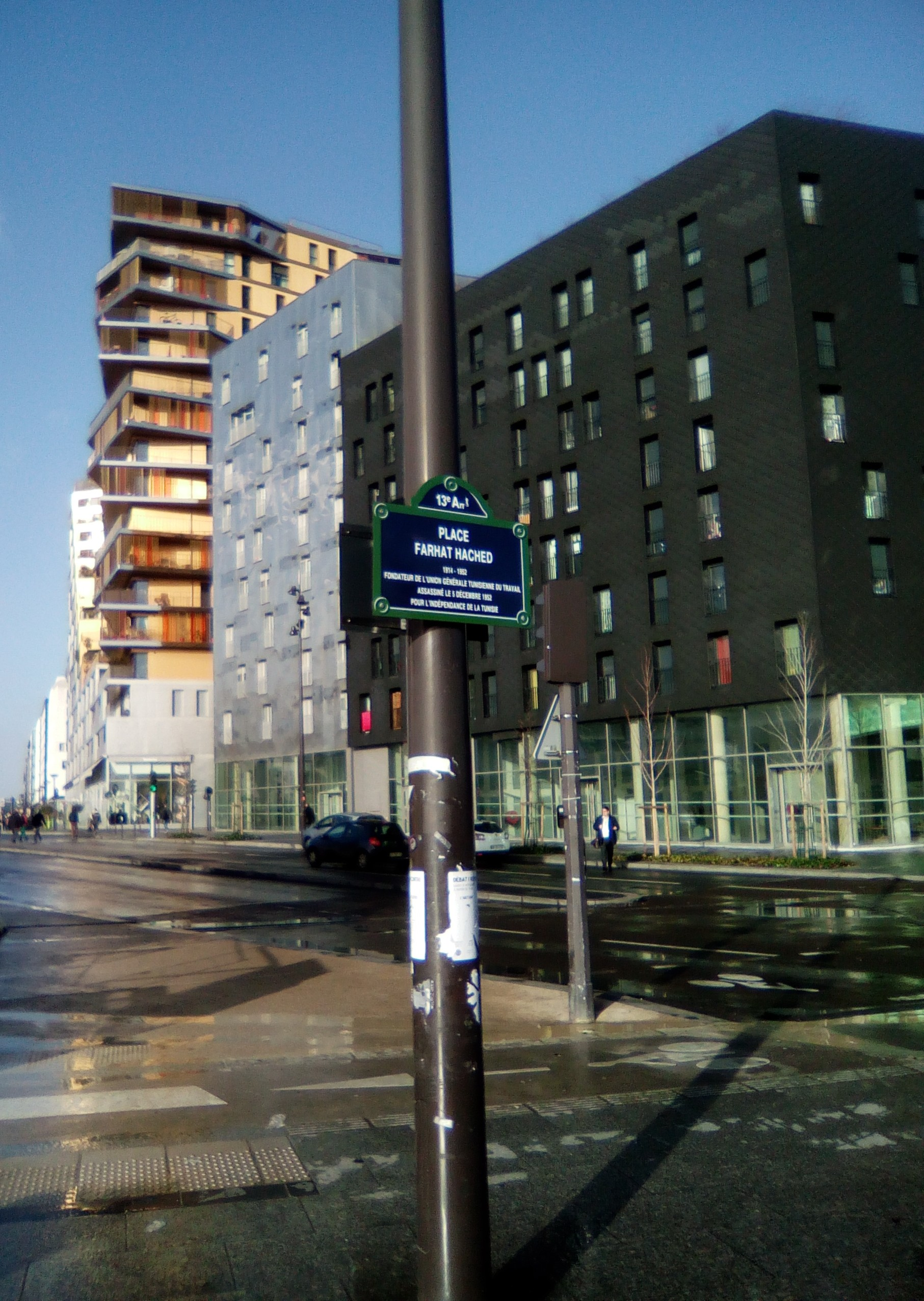 Place Farhat Hached, Paris. Au second plan, l'avenue de France.